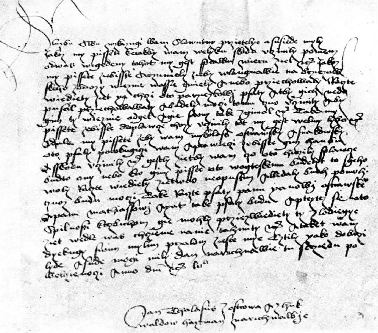 Dopis Jana Talafúsa obyvatelům Bardějova